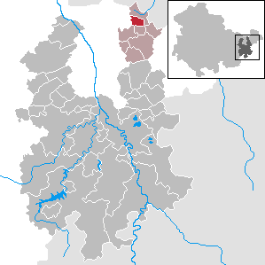 Hirschfeld in Thuringia - District Greiz